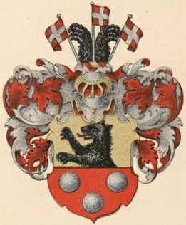 Bagge af Boo suguvõsa vabahärravapp